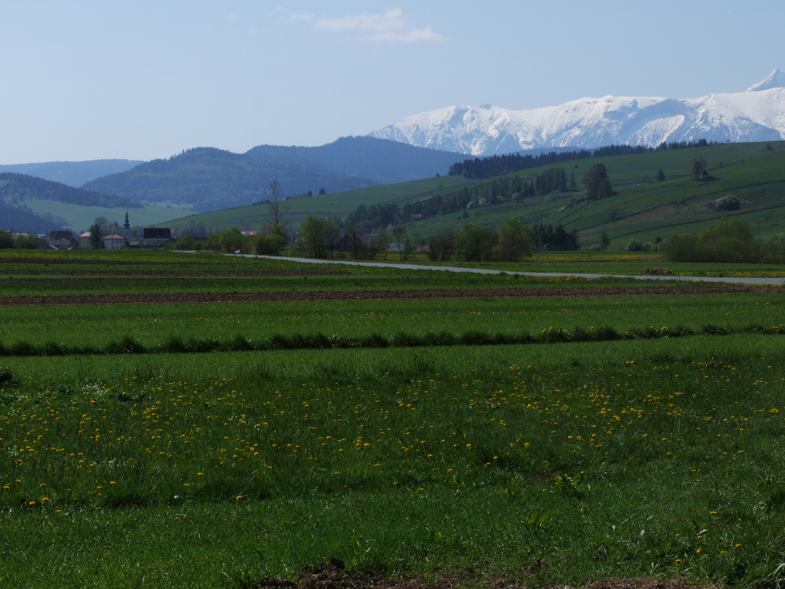 Widok z Niedzicy w stronę Kacwina na Zamagurze i Tatry Bielskie